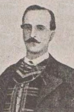 Joaquín Elió Mencos portree